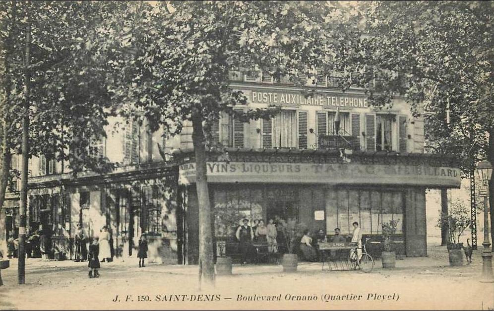 Saint-Denis, boulevard Ornano, quartier ¨Pleyel